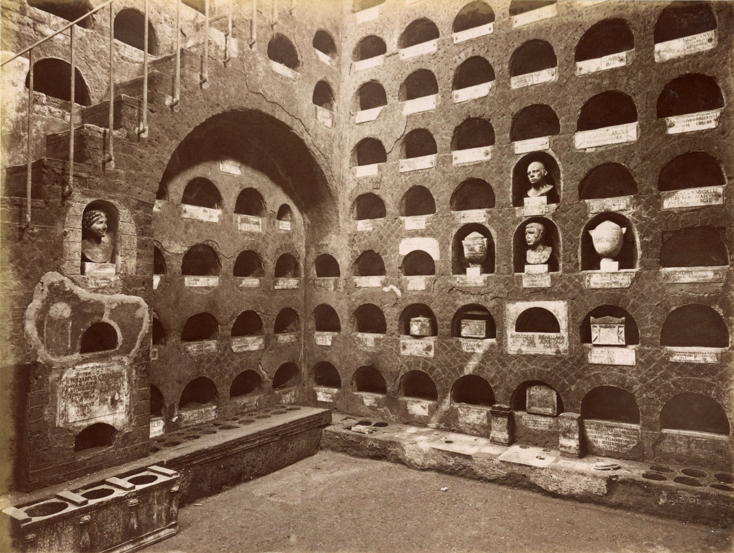 Roma. Colombario nella Vigna Codini.